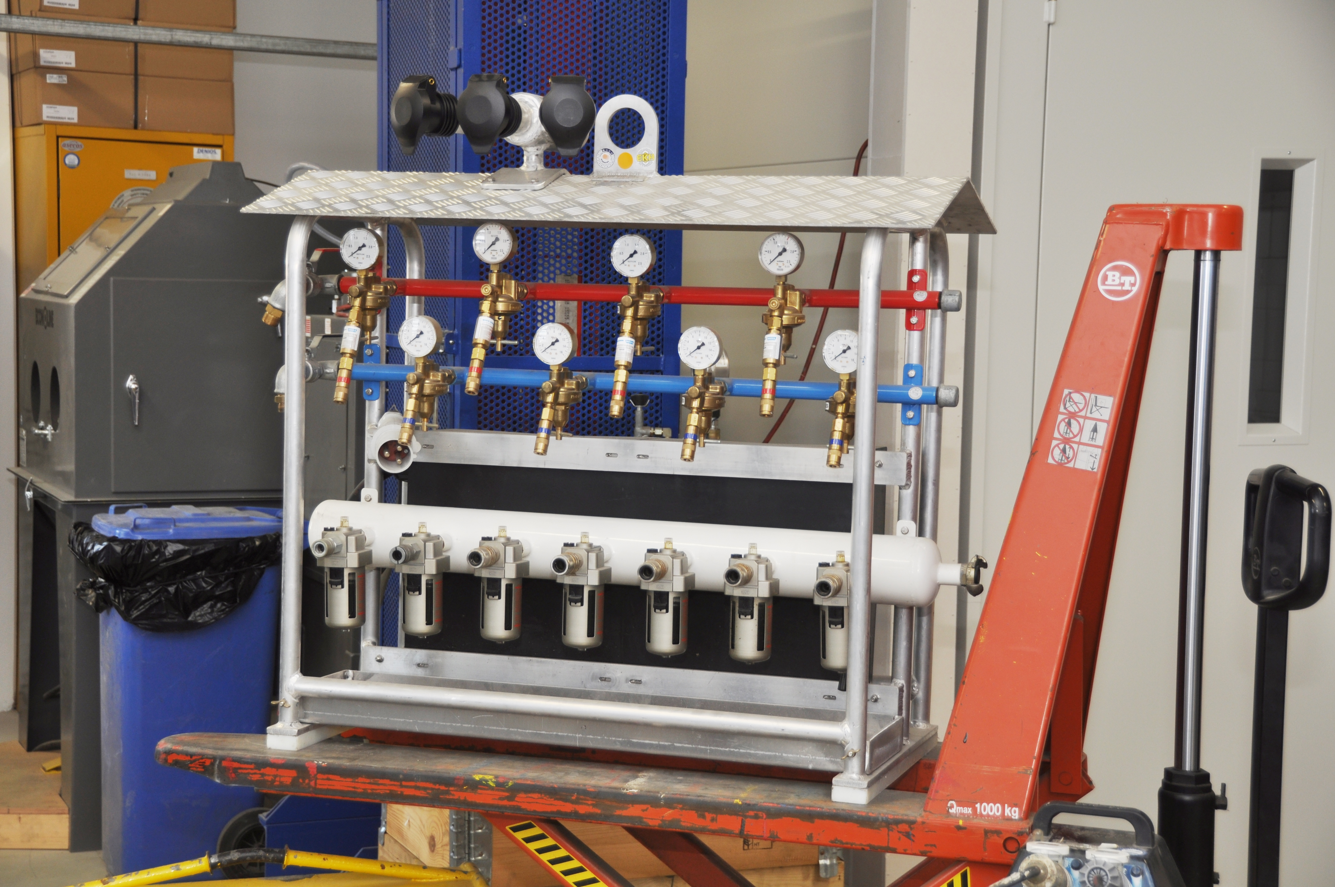 De machines van de werf op de open dag van Damen Gorinchem op 09-11-2013.